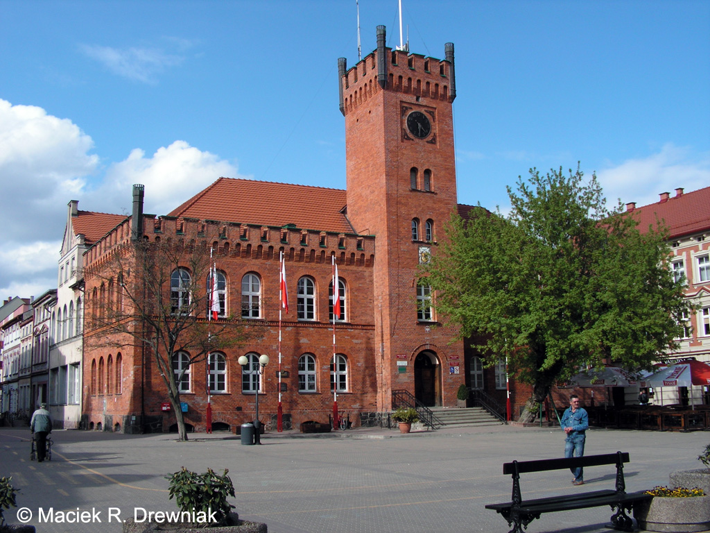 Szczecinek, pl. Wolności 13 - ratusz miejski